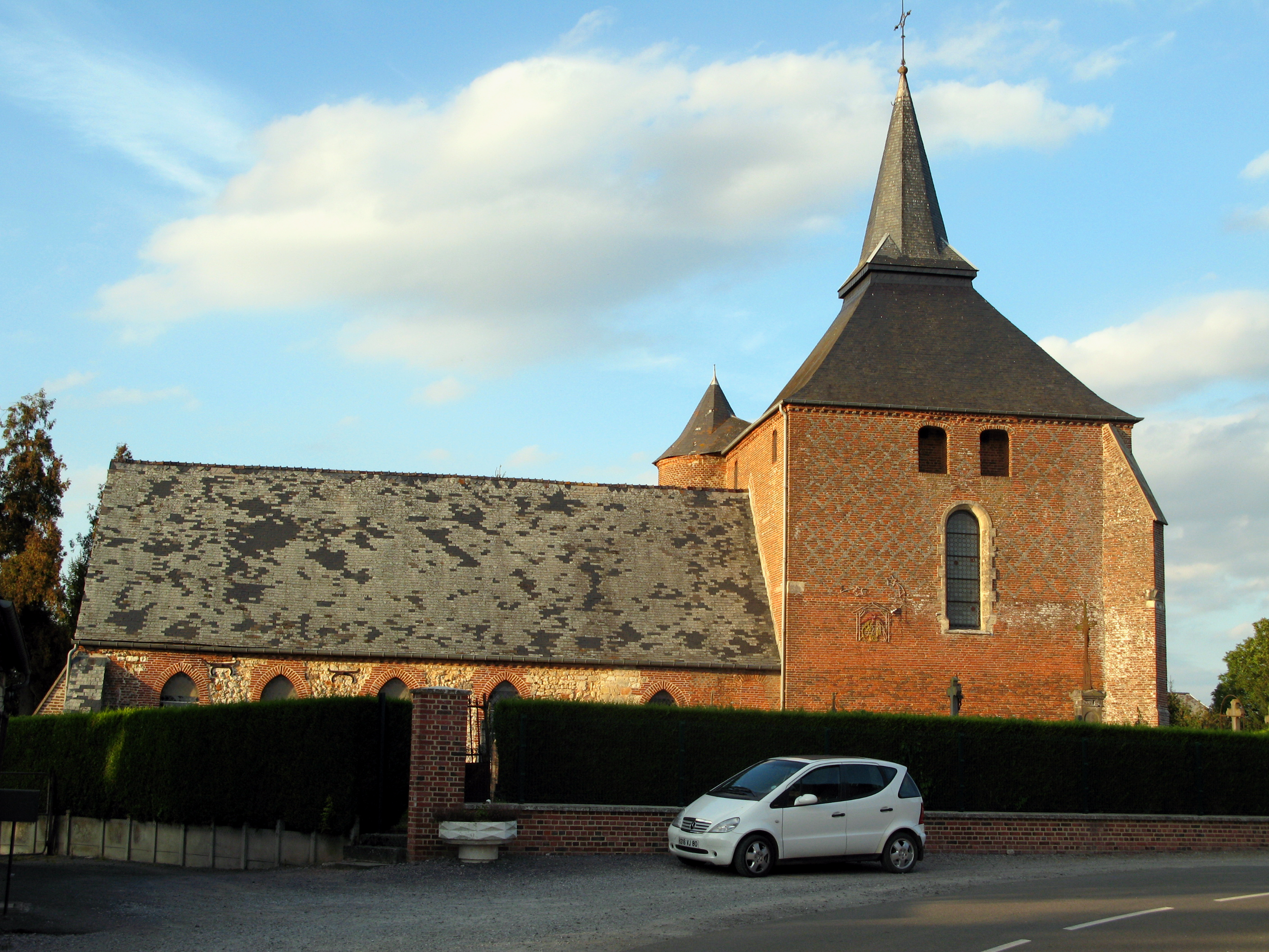 Rogny (Aisne, France) - L'église fortifiée.